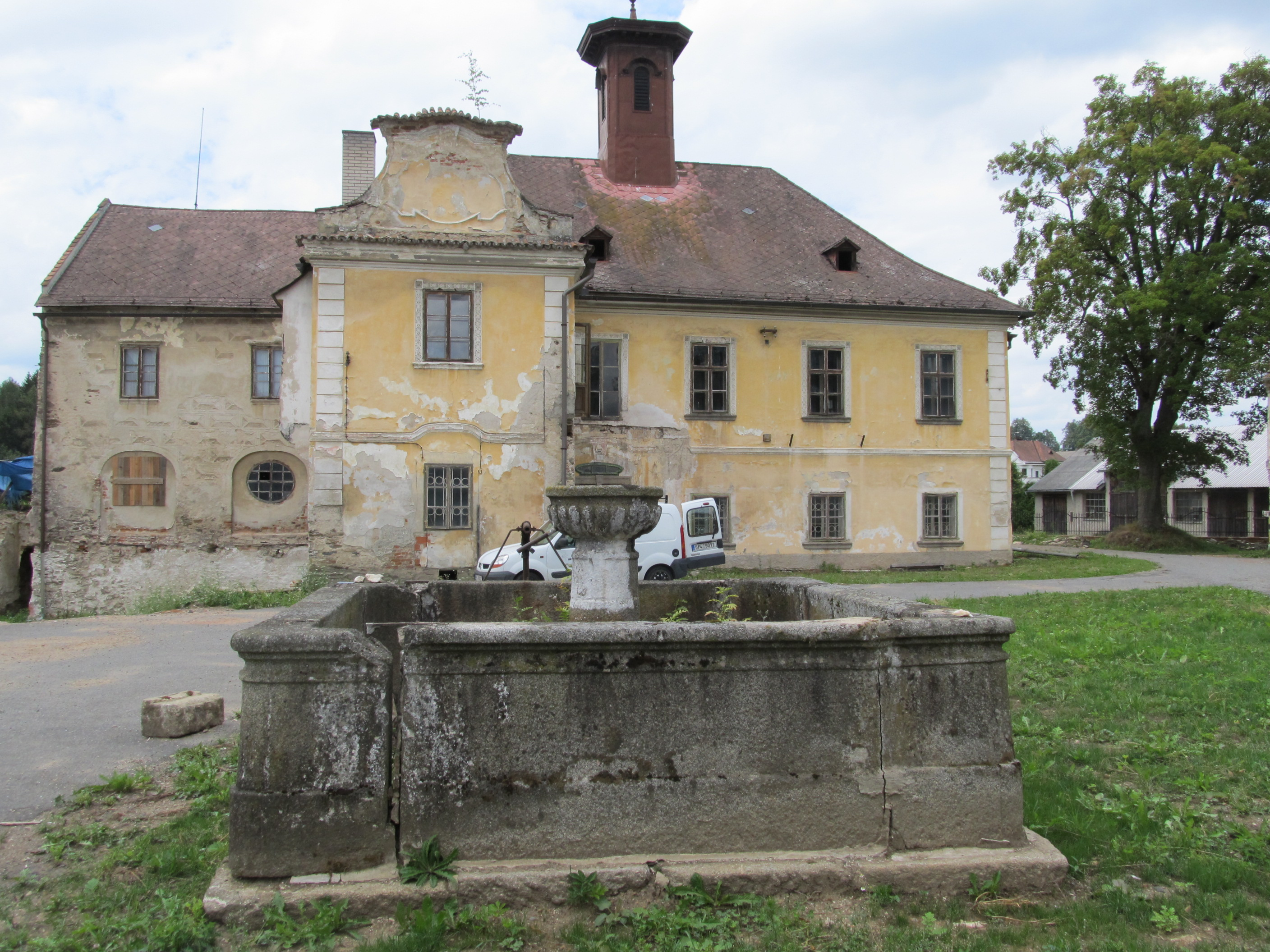 Nemilkov - renesanční zámek